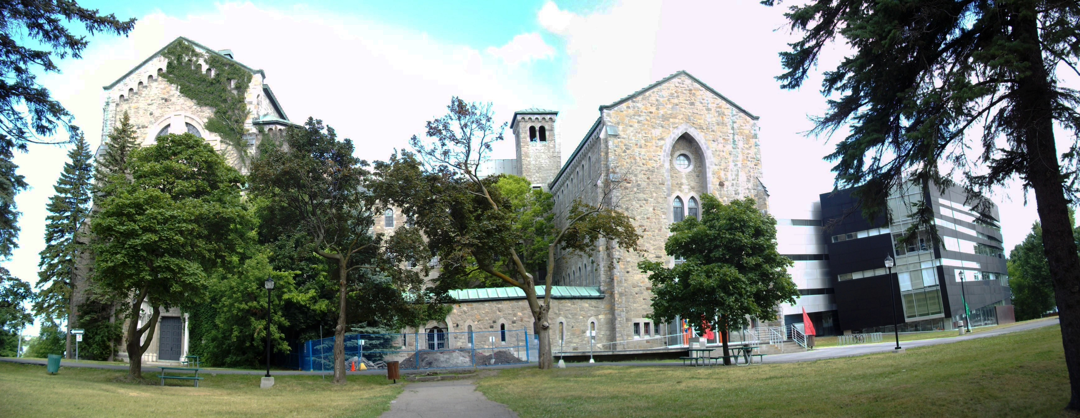 Cégep Gérald-Godin, 15 615, boulevard Gouin Ouest, Montréal. La partie ancienne à gauche était le monastère des Pères de Sainte-Croix (info)